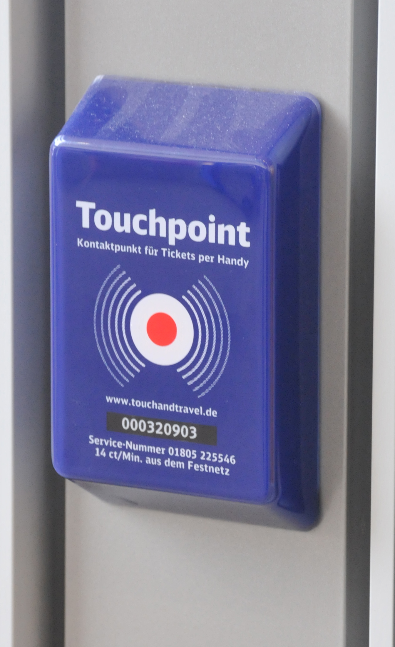 DB Touch-point kaartlezer met loctie code en NFC-chip van mobile telefoon.